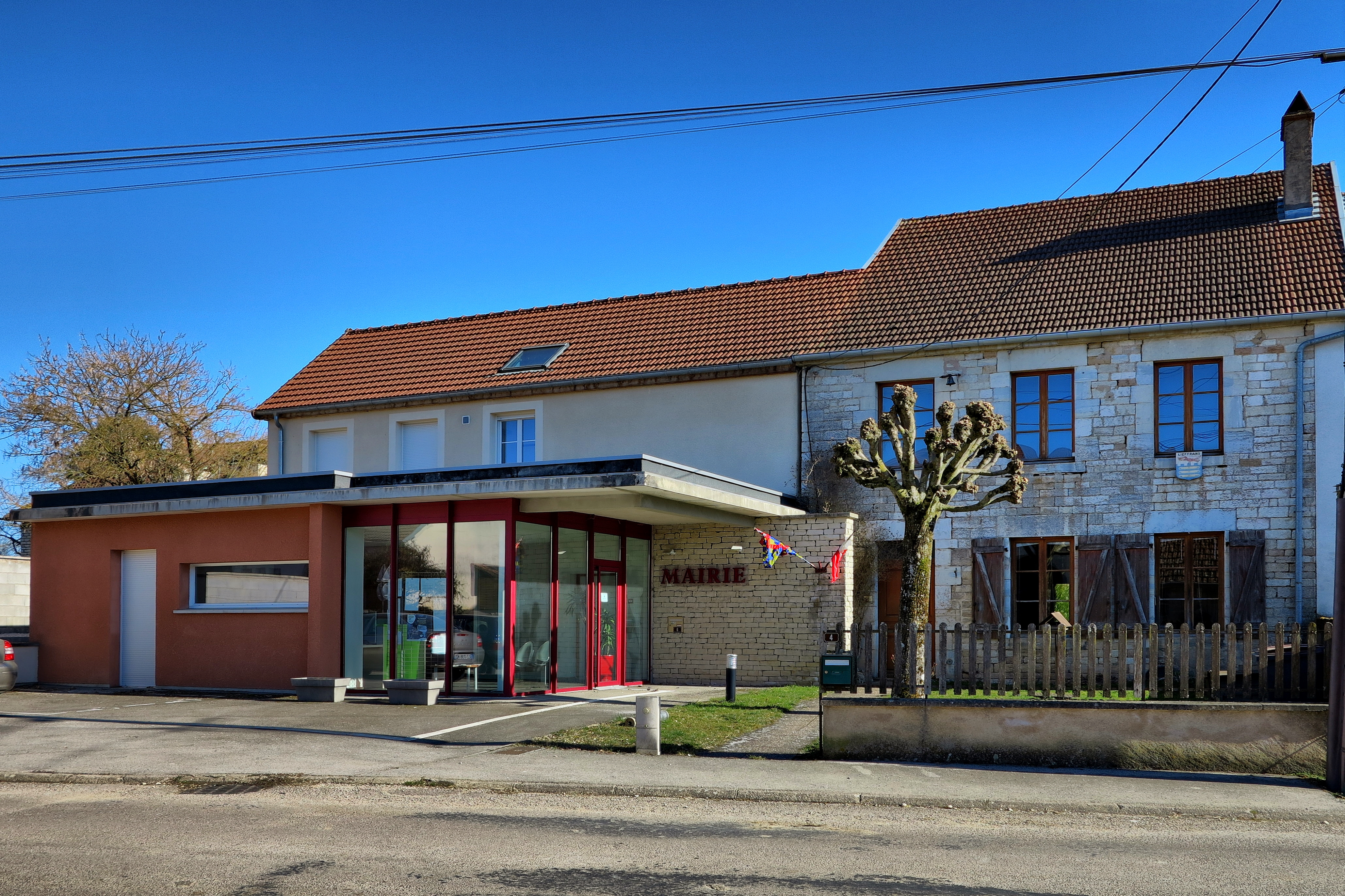 La mairie de Lieffrans